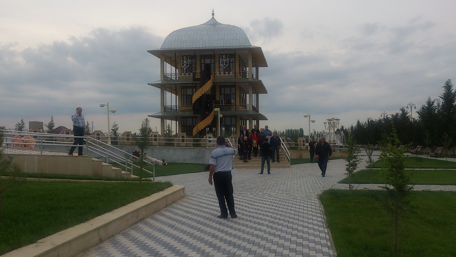 Təhsil nəşriyyatının kollektrivi. Kitab sərgisi günü. Azərbaycan